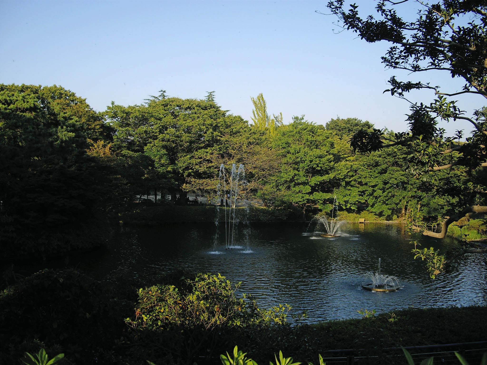 杉並区立妙正寺公園